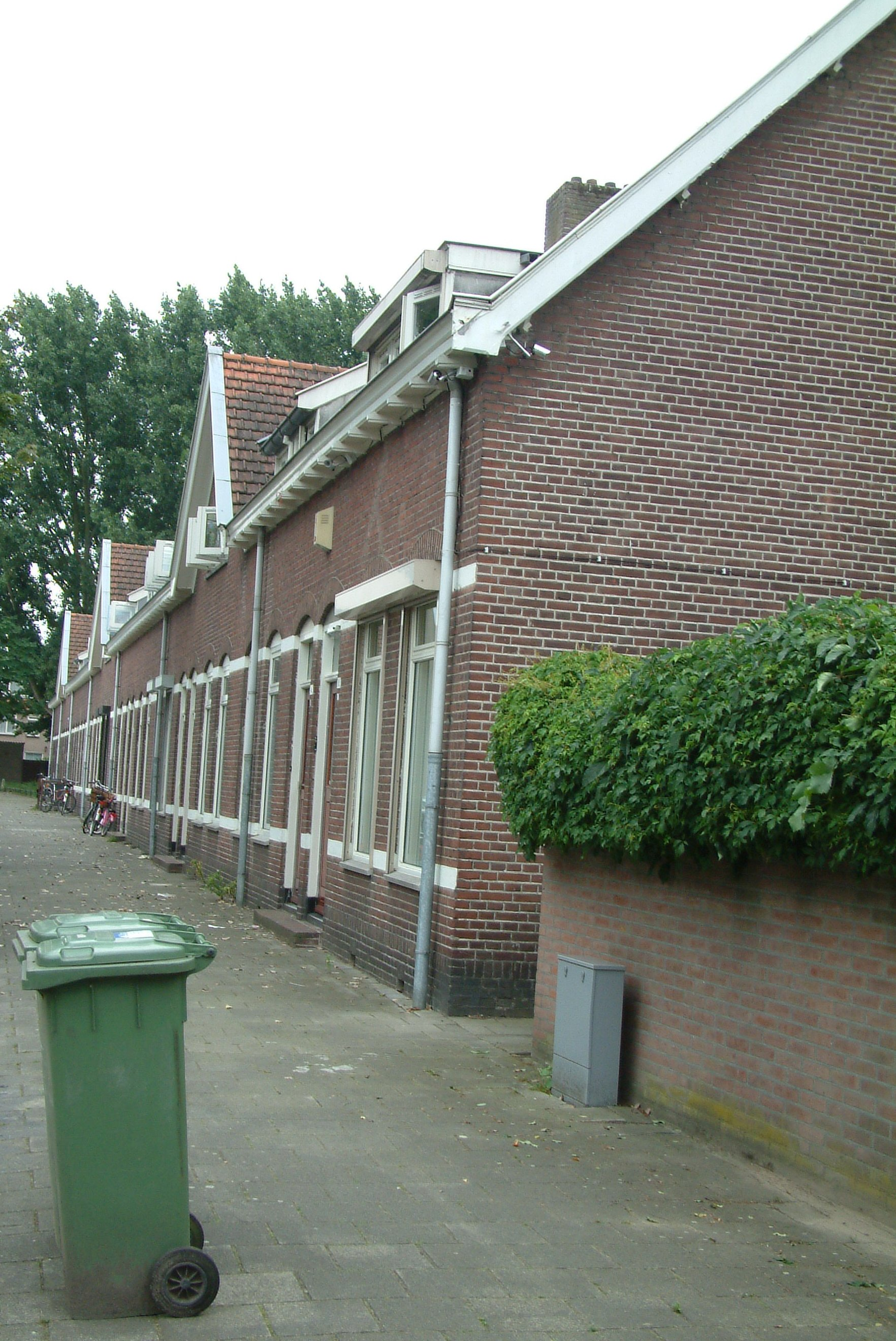 Straat in Philipsdorp, Eindhoven Strijp